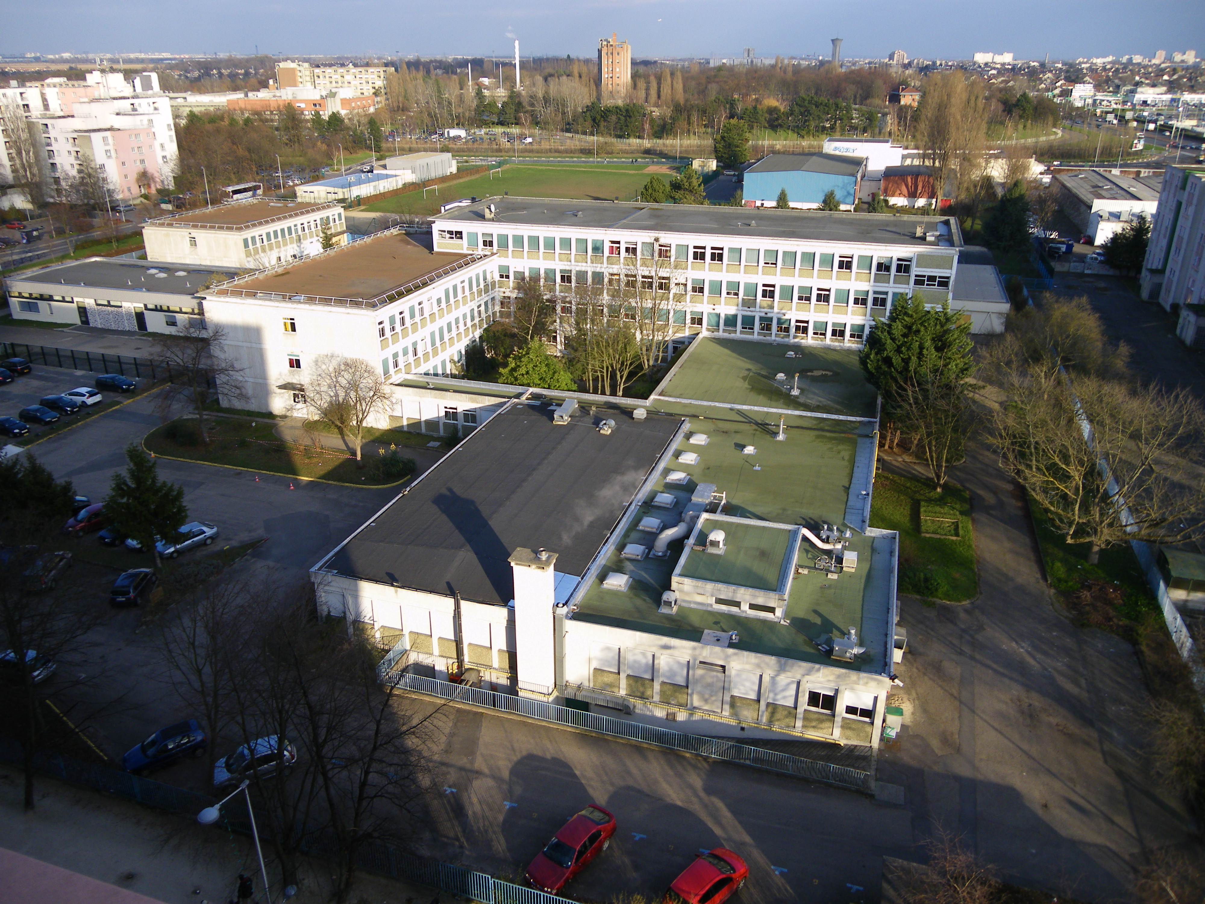 collège